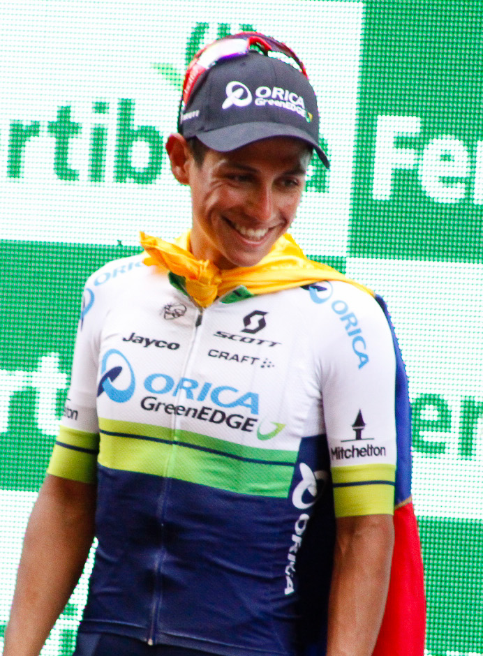 Vuelta a España 2015 | 8ª Etapa Puebla de Don Fadrique - Murcia-95